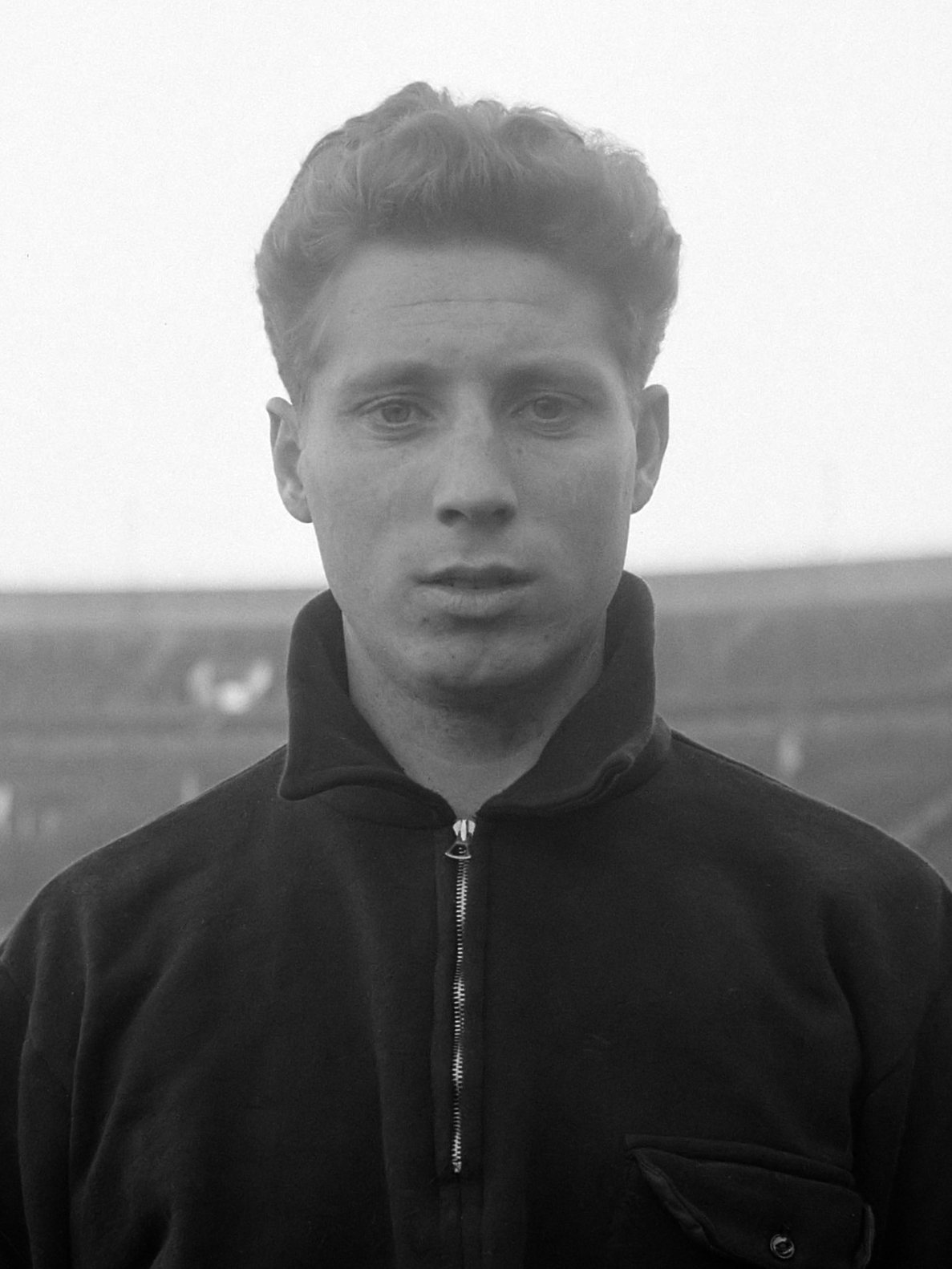 Voetbal. Tonny Van der Linden (DOS) 13 maart 1957